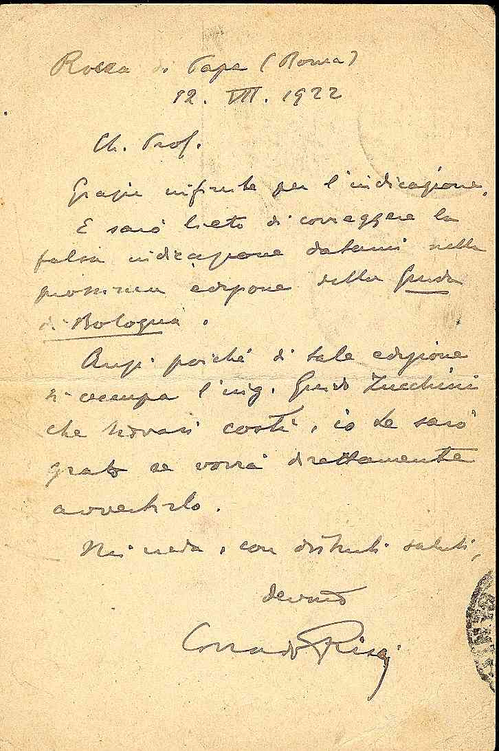 Cartolina postale autografa di Corrado Ricci datata 12 luglio 1922 (anno errato perchè il timbro postale è del 13.7.1921) da Rocca di Papa Roma e indirizzata al pittore Antonio Mosca in cui si scusa per il refuso della 5a edizione della sua Guida di Bologna edita da Nicola Zanichelli di Bologna in cui si attribuiscono erroneamente a tale Romano Alberghini le opere di ornato del catino della cupola e dell'abside della chiesa di Santa Maria Maddalena a Bologna sita in via Zamboni 49 a lui spettanti. L'ing. Guido Zucchini si incaricherà della faccenda.